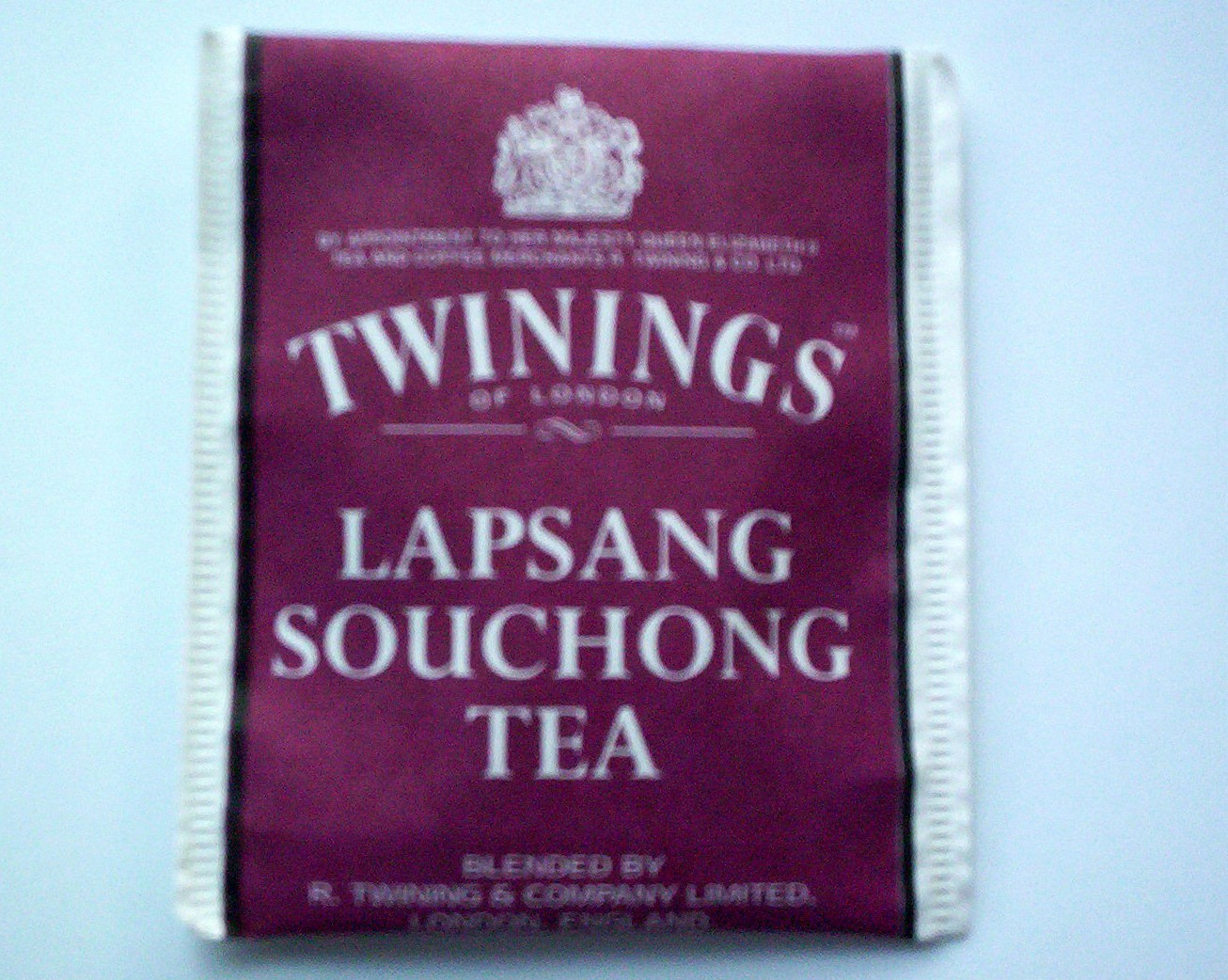 Twining's Lapsang Souchong